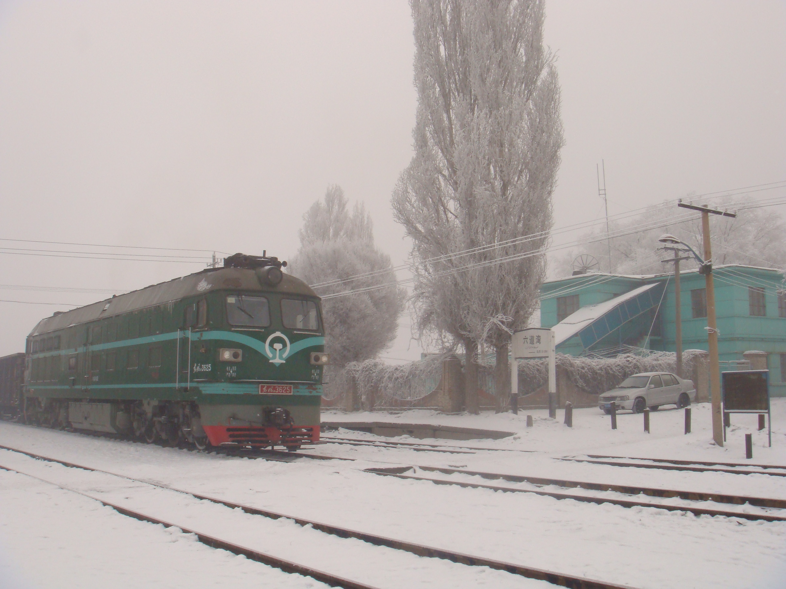 中国新疆乌鲁木齐市 China Xinjiang Urumqi, China Xinjiang Urumqi Welcome you to tour the, Китай Синьцзяна Урумчи приветствовать Вас на экскурсию, الصين ترحب زيارتك لاورومتشى فى شينجيانغ, 中国新疆のウルムチへの訪問を歓迎する, 中国新疆乌鲁木齐欢迎您来观光旅游